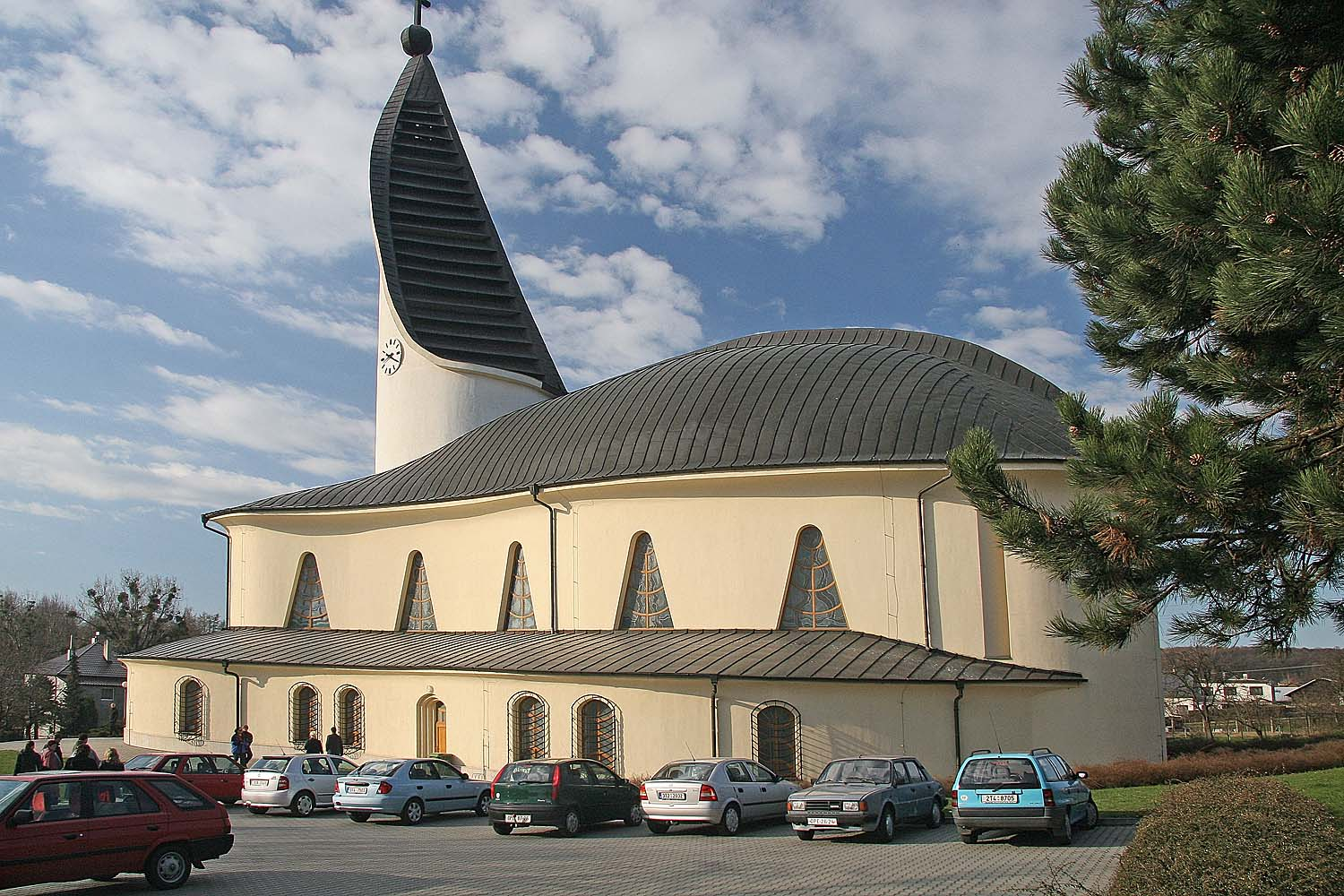 Kostel Krista Dobrého pastýře ve Hněvošicích, district Opava, Czech Republic